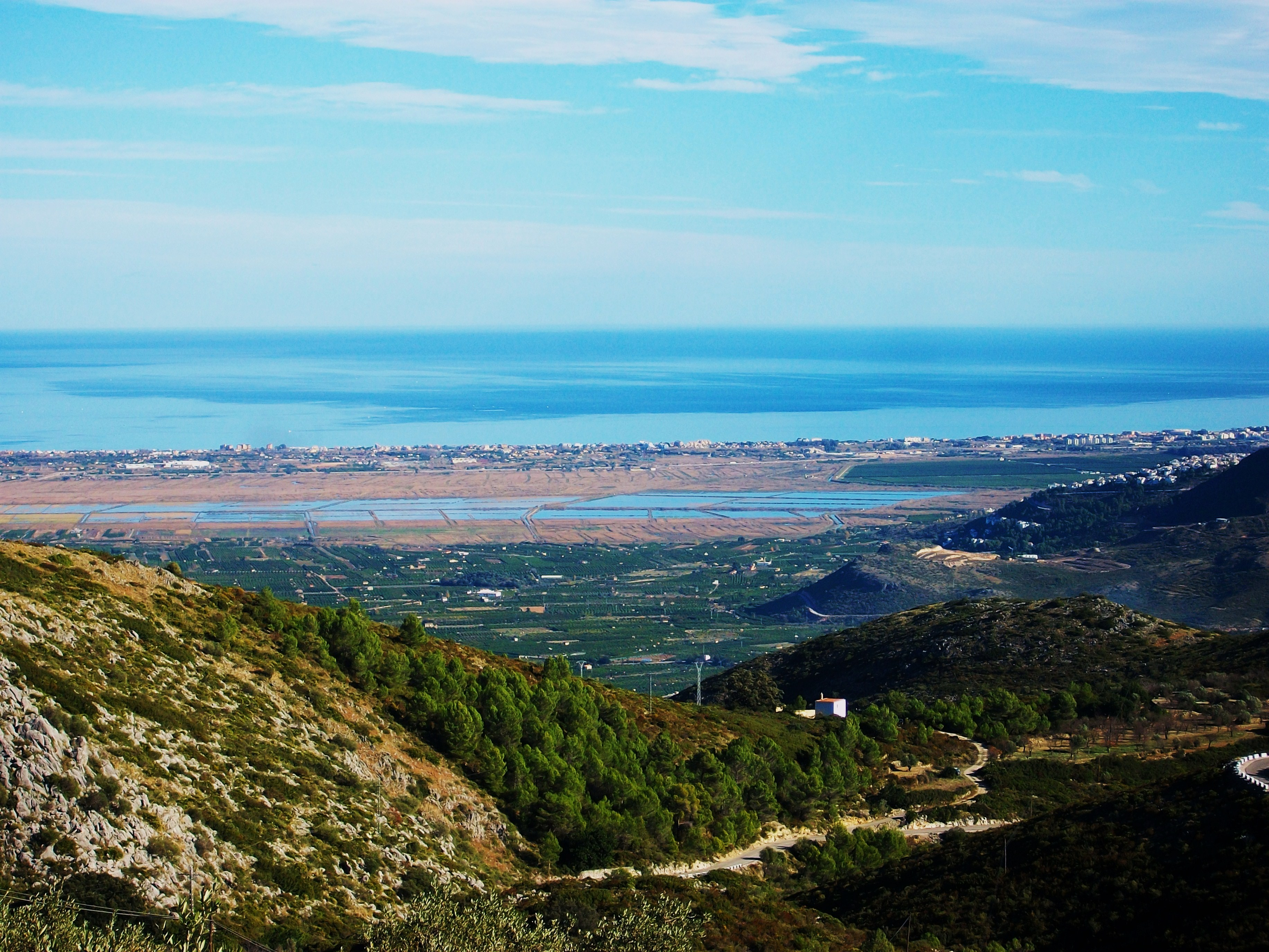 Marjal de Pego, Marina Alta, País Valencià.